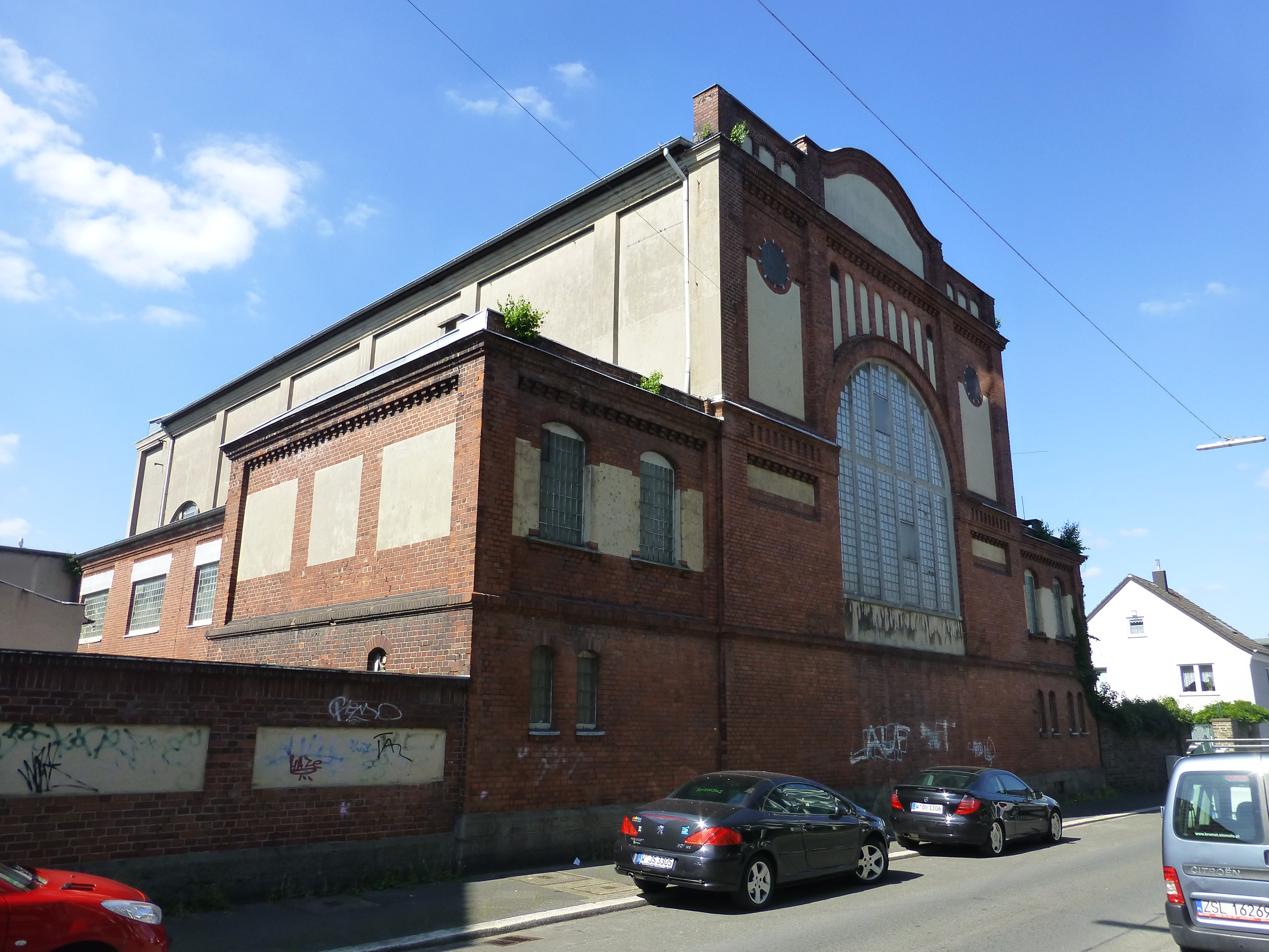 Wittensteinstraße, Wuppertal